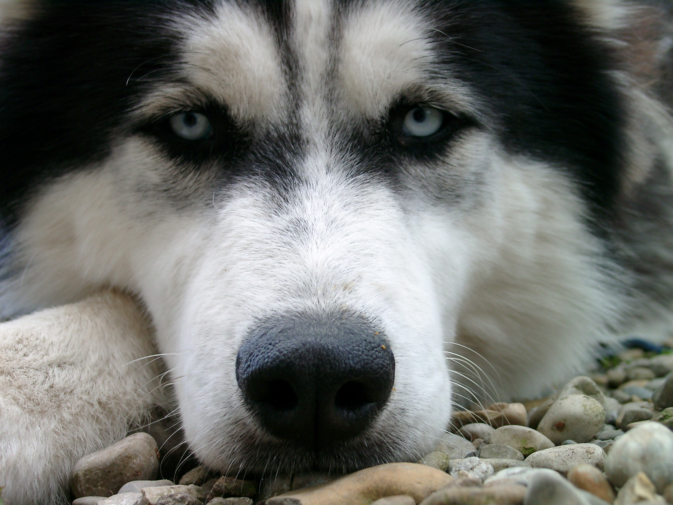 Husky.